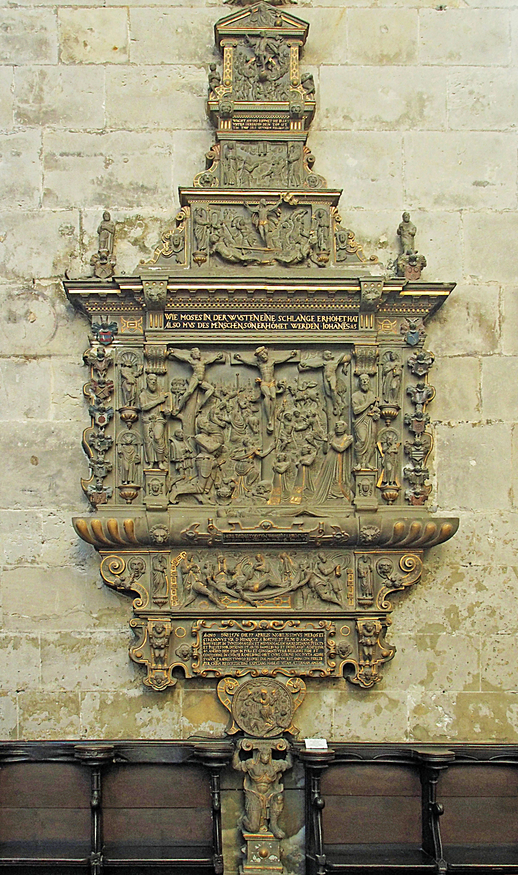 Bortfeld-Epitaph (1576) im Chor der Marktkirche St. Benedikti (Quedlinburg)